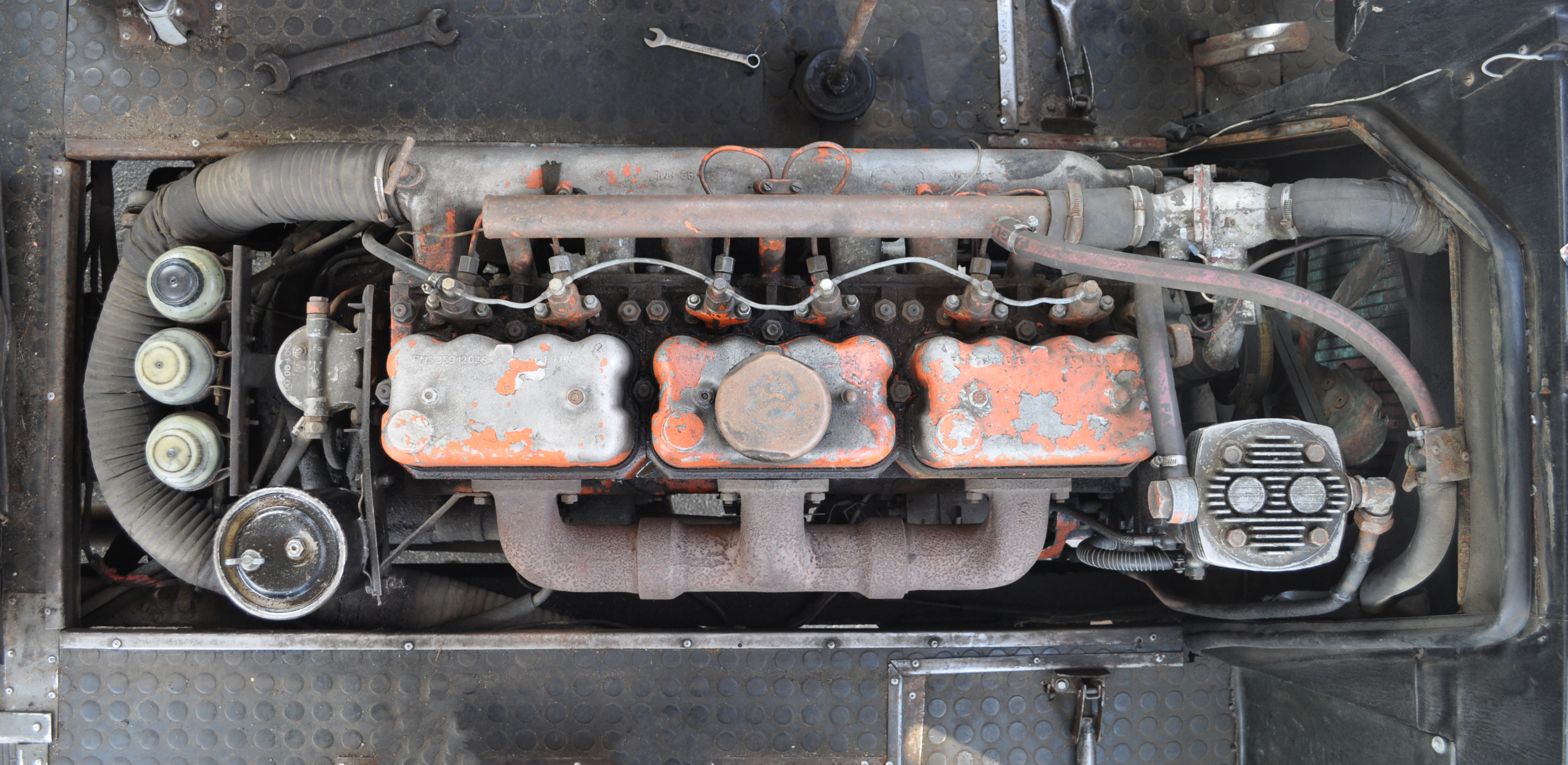 Jelcz 080. Silnik. Zdjęcie dzięki uprzejmości Adama Zylbertala z Klubu Sympatyków Transportu Miejskiego z Wrocławia. jelcz080.pl